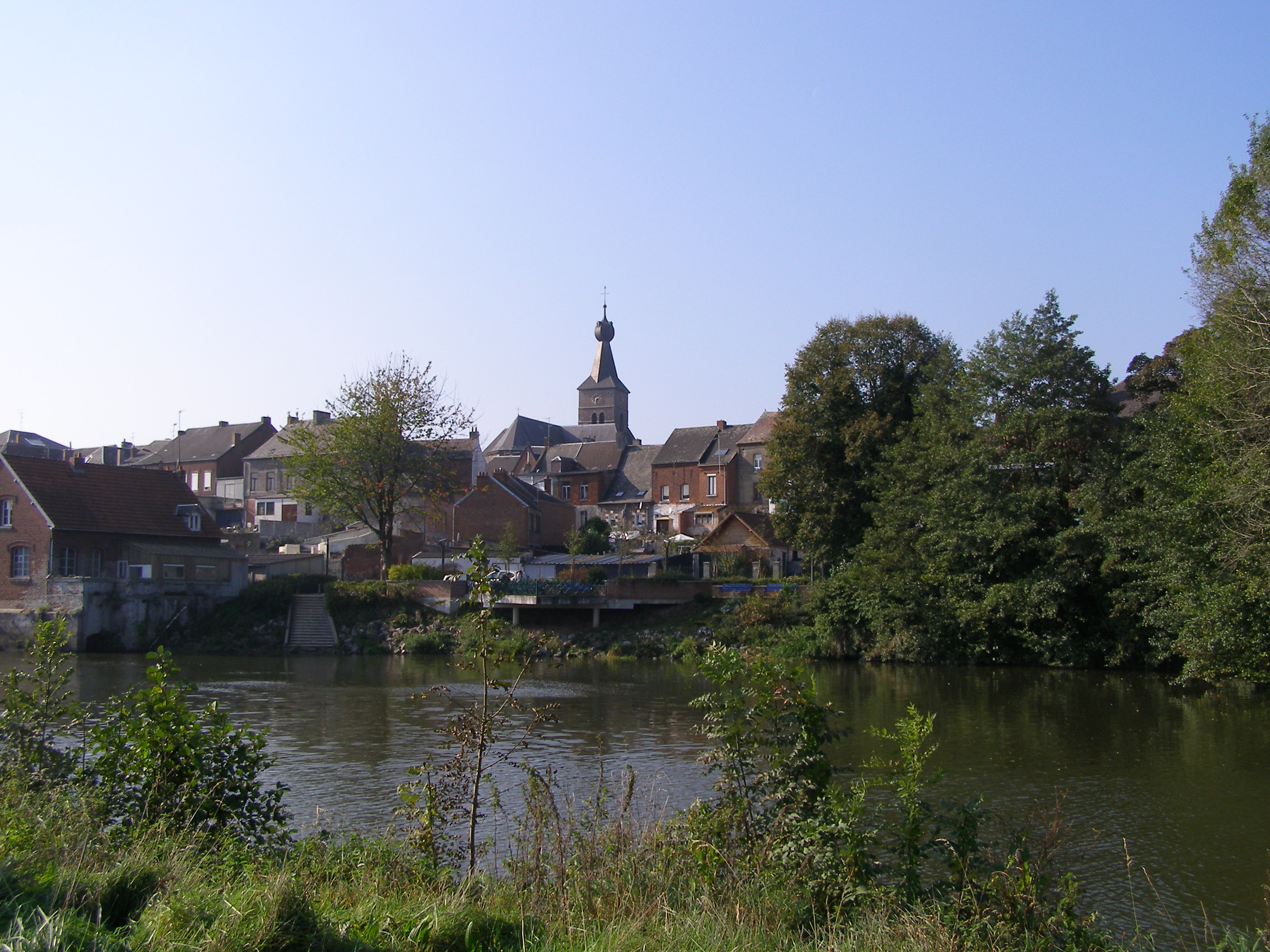 Vue de la ville.